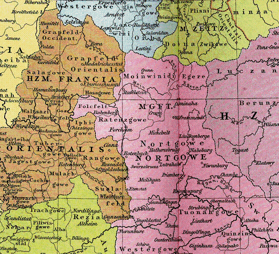 Heiliges Römisches Reich um 1000, Ausschnitt Nordgau